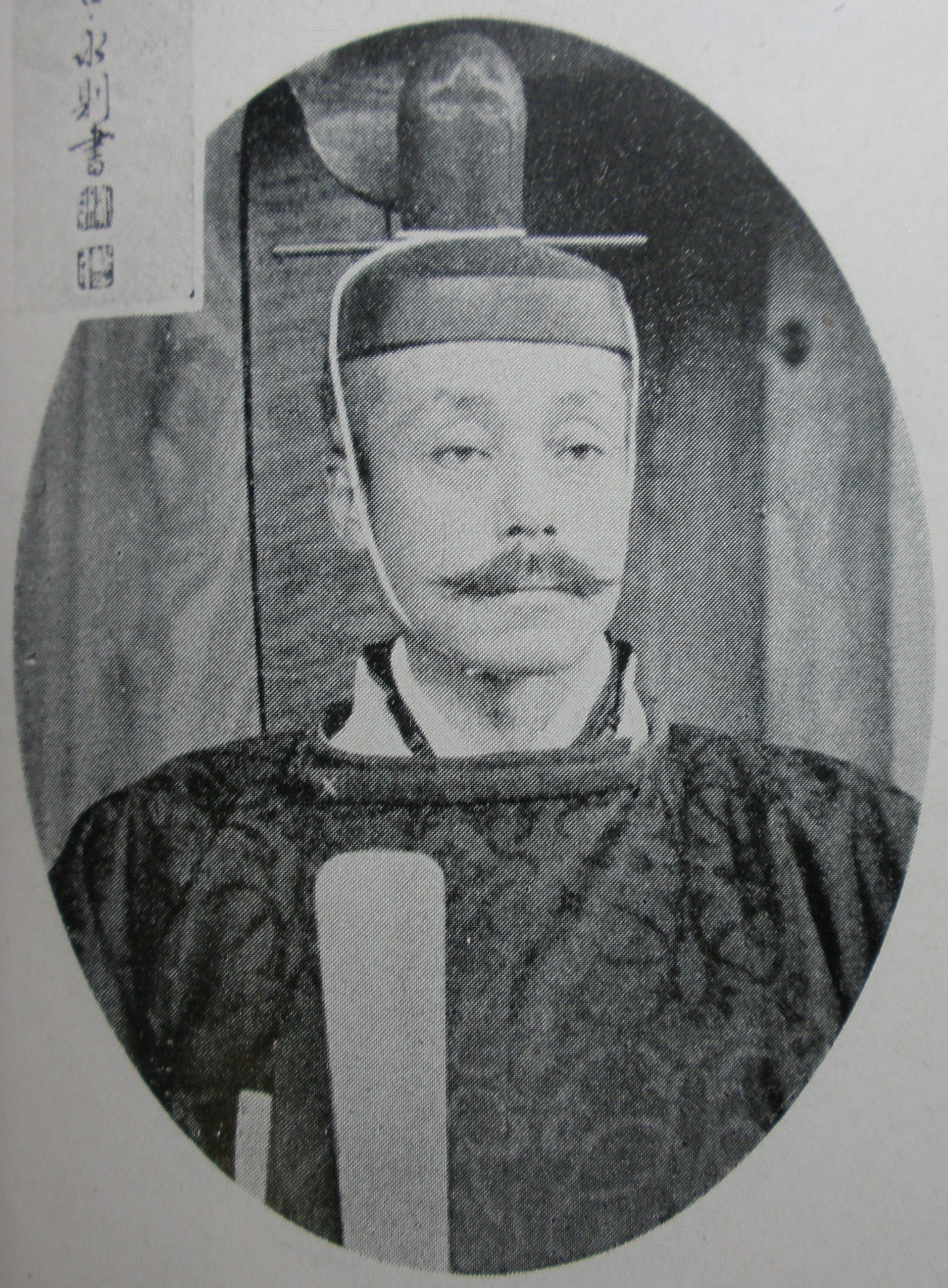 大礼使典儀官・子爵高倉永則